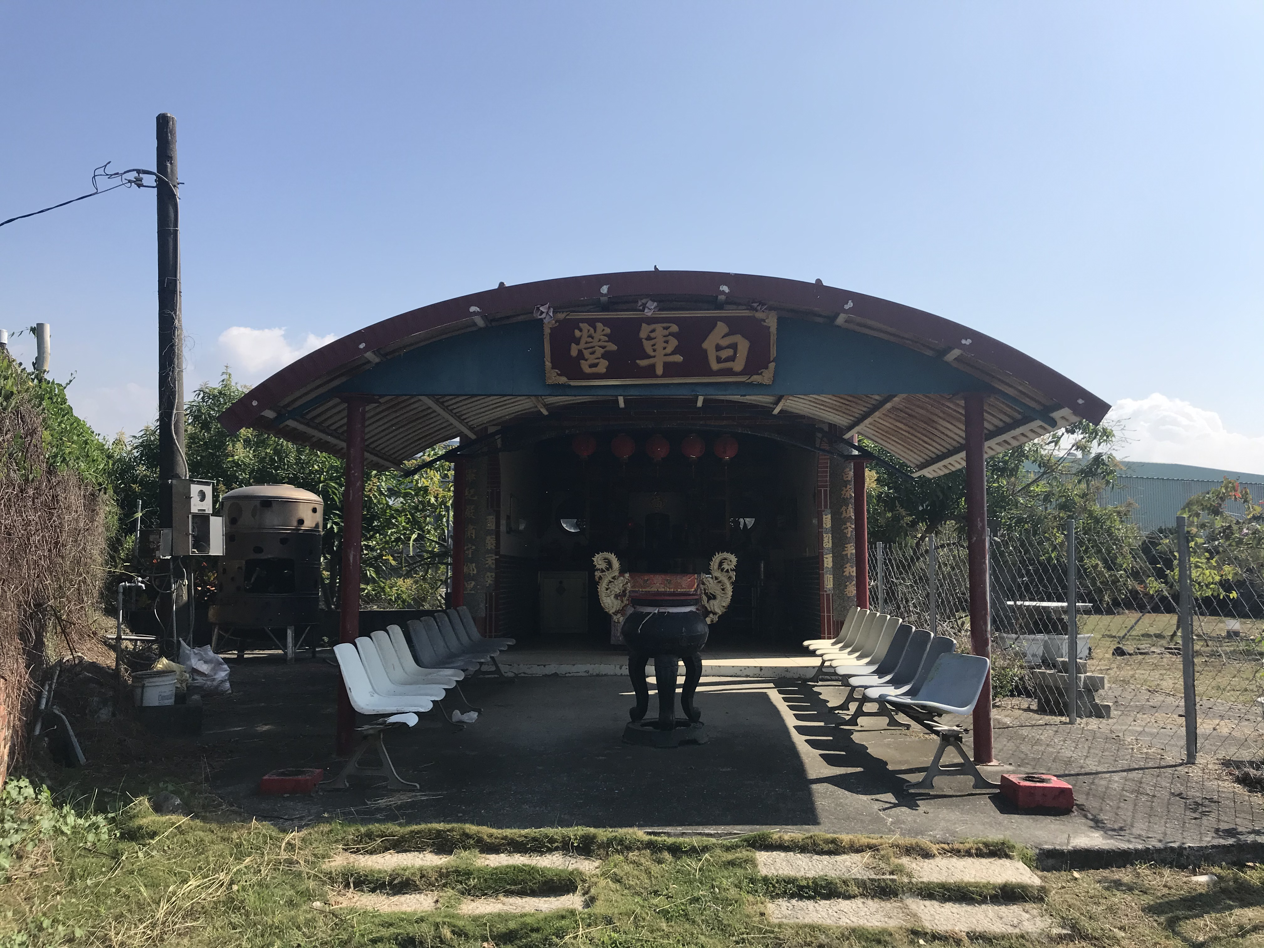 白軍營淮軍義塚照